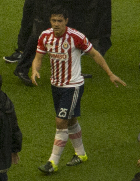 América vs Guadalajara